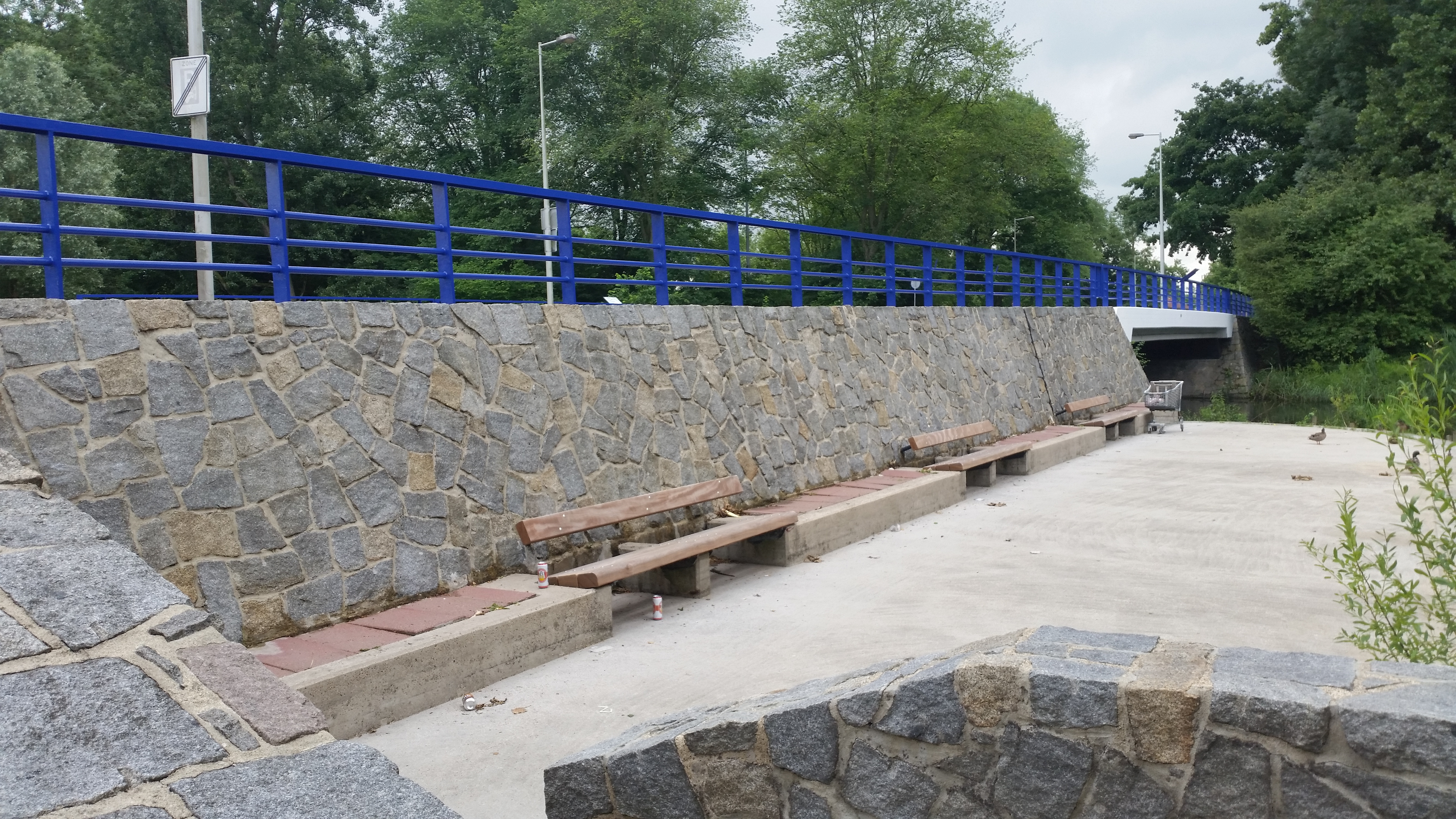 Brug 715, Piet Bakkerbrug na opknapbeurt